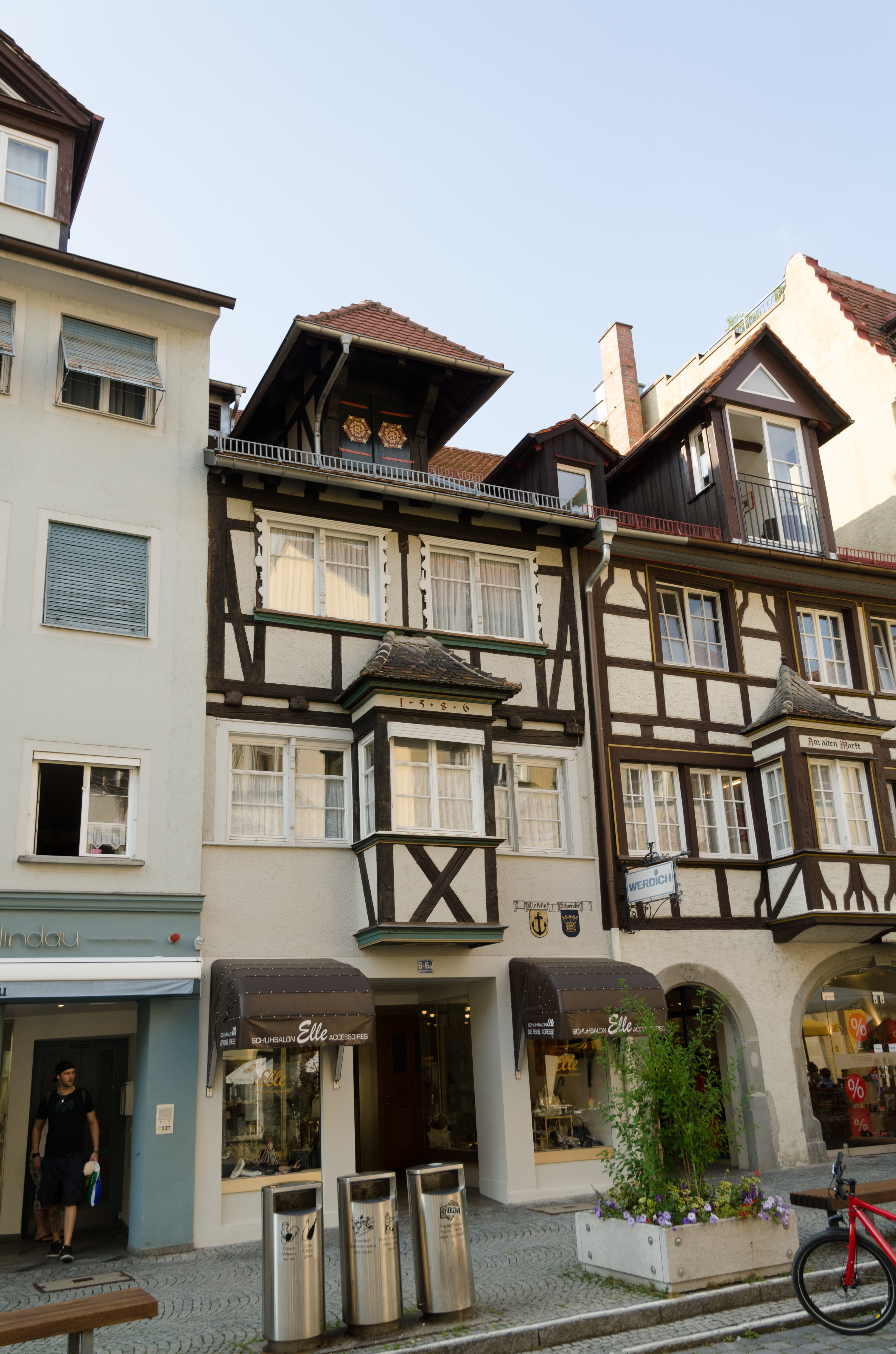 Lindau, Maximilianstraße 6